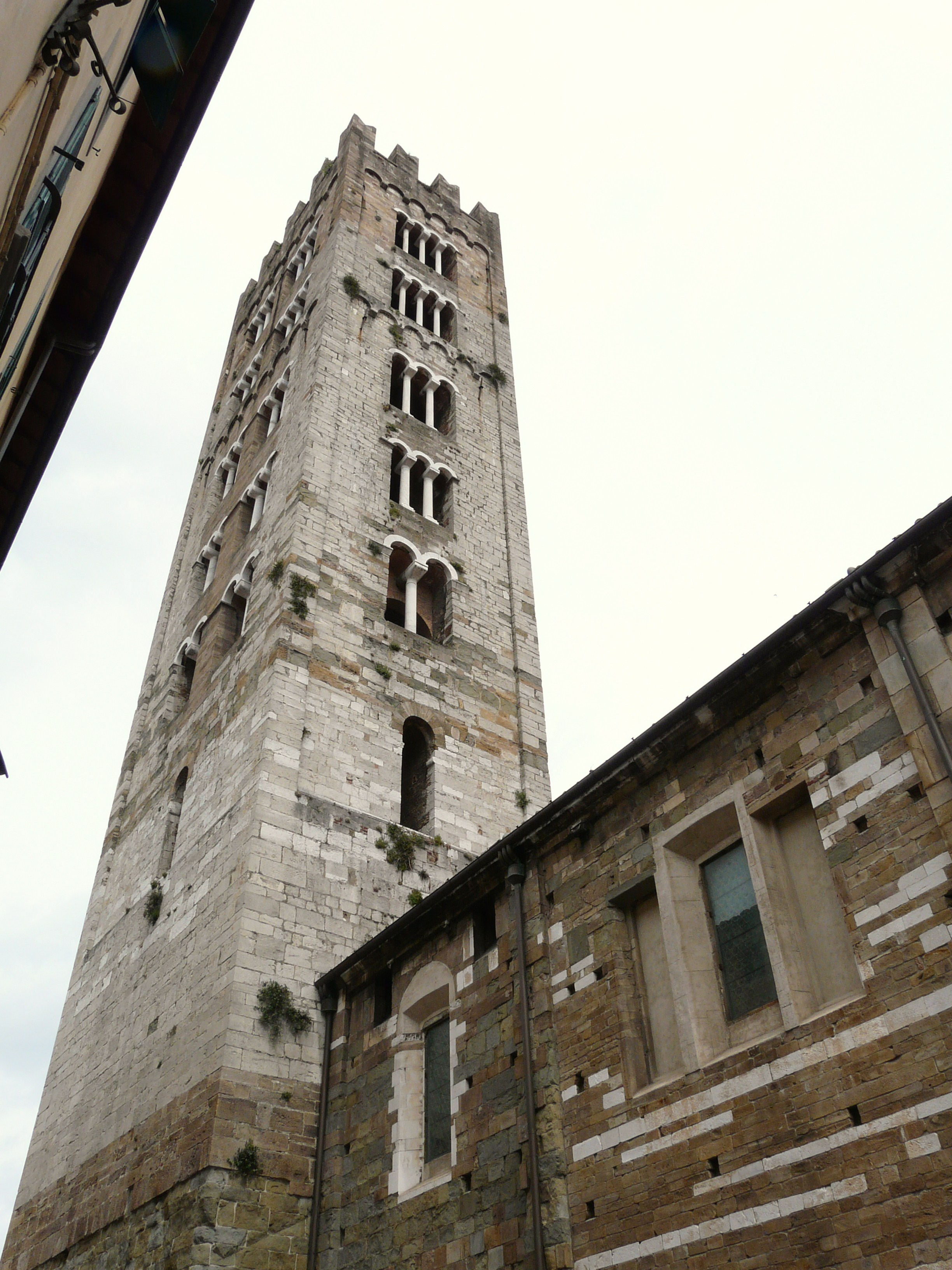 Chiesa di San Frediano, Comune di Lucca, Toscana, Italia